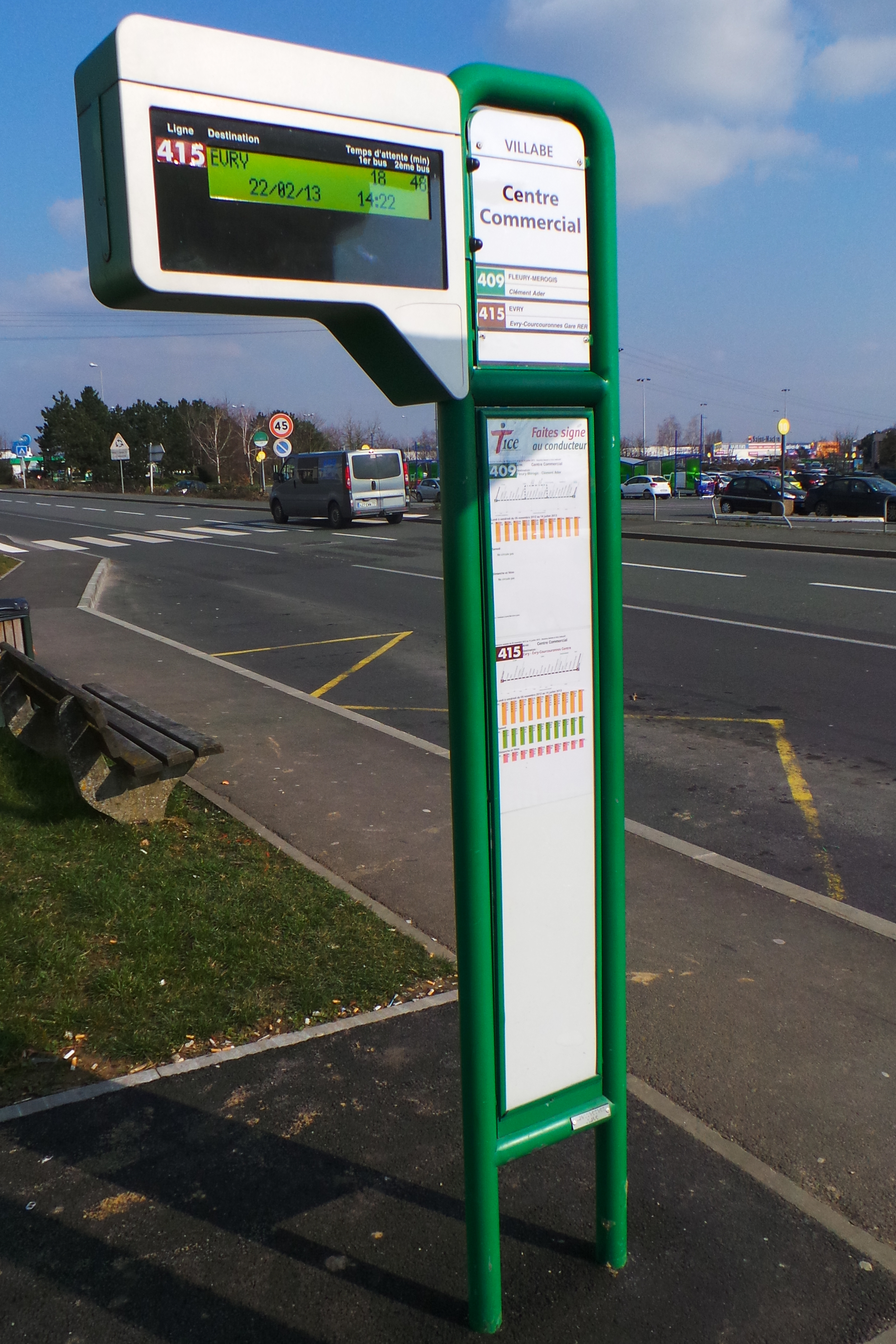 Système d'information en ligne du réseau TICE - Zone commerciale de Villabé. Essonne. France